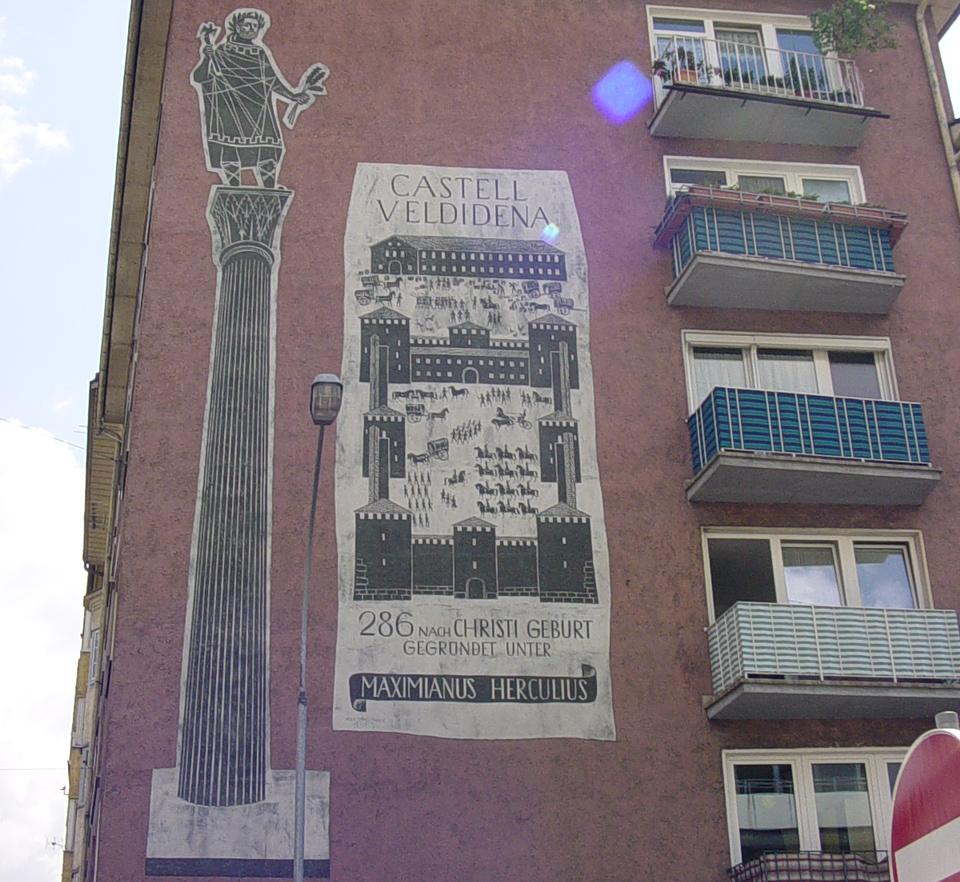 Sgrafitto von Max Spielmann (1963) mit Darstellung des Castell Veldidena an einer Hausmauer in Wilten. This media shows the remarkable cultural object in the Austrian state of Tyrol listed by the Tyrolean Art Cadastre with the ID 68404. (on tirisMaps, pdf, more images on Commons, Wikidata)